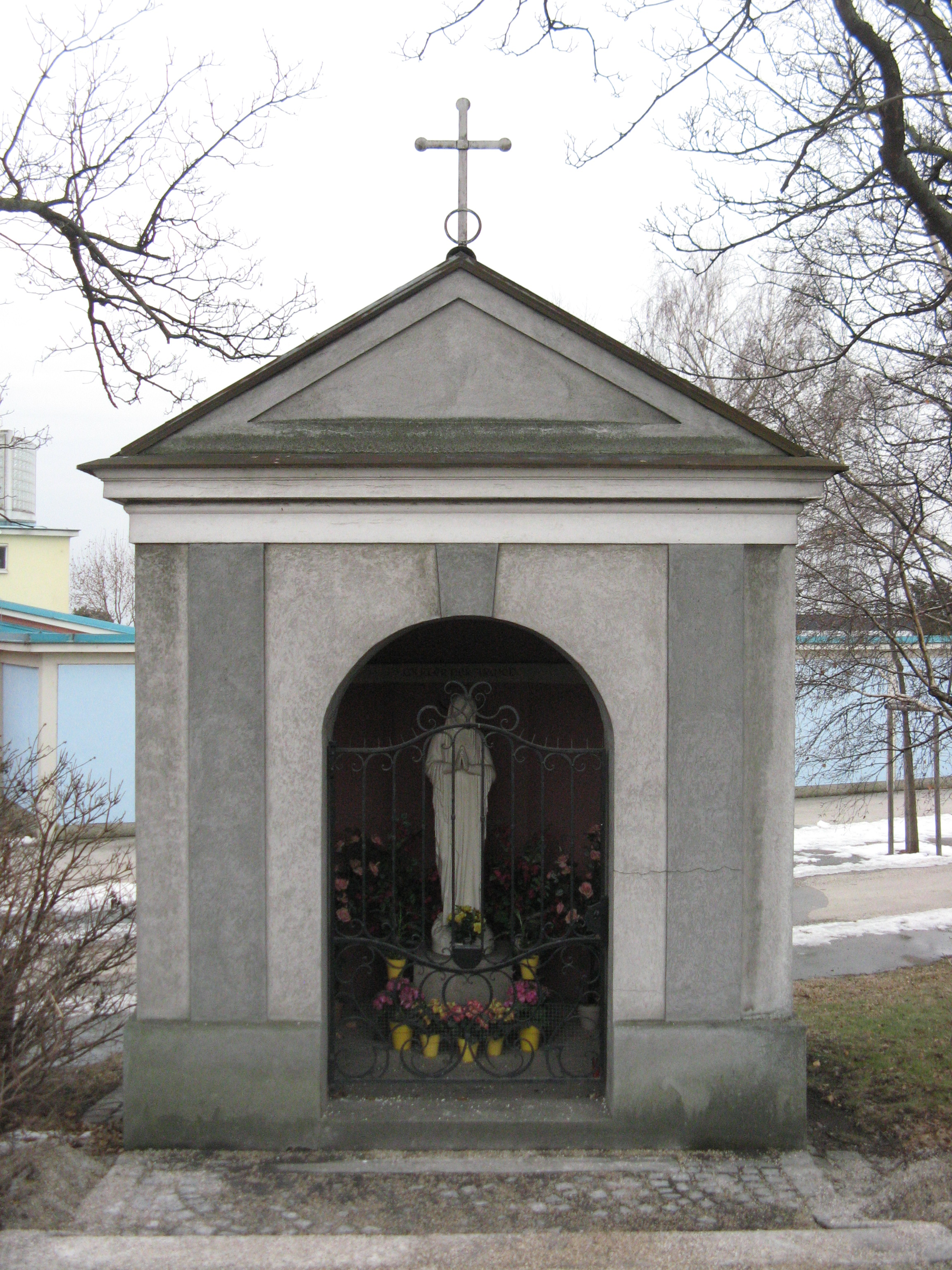 Gradner Kapelle (1828), Ludwig-von-Höhnel-Gasse 2, Wien-Favoriten